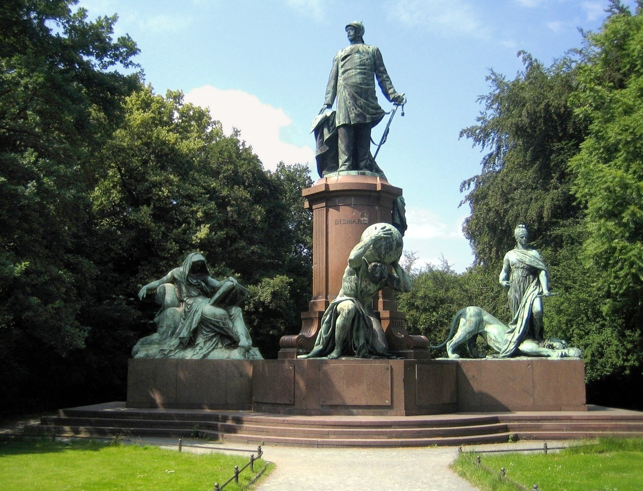 Das Bismarck-Nationaldenkmal von Reinhold Begas am Großen Stern in Berlin-Tiergarten. Gesamtansicht